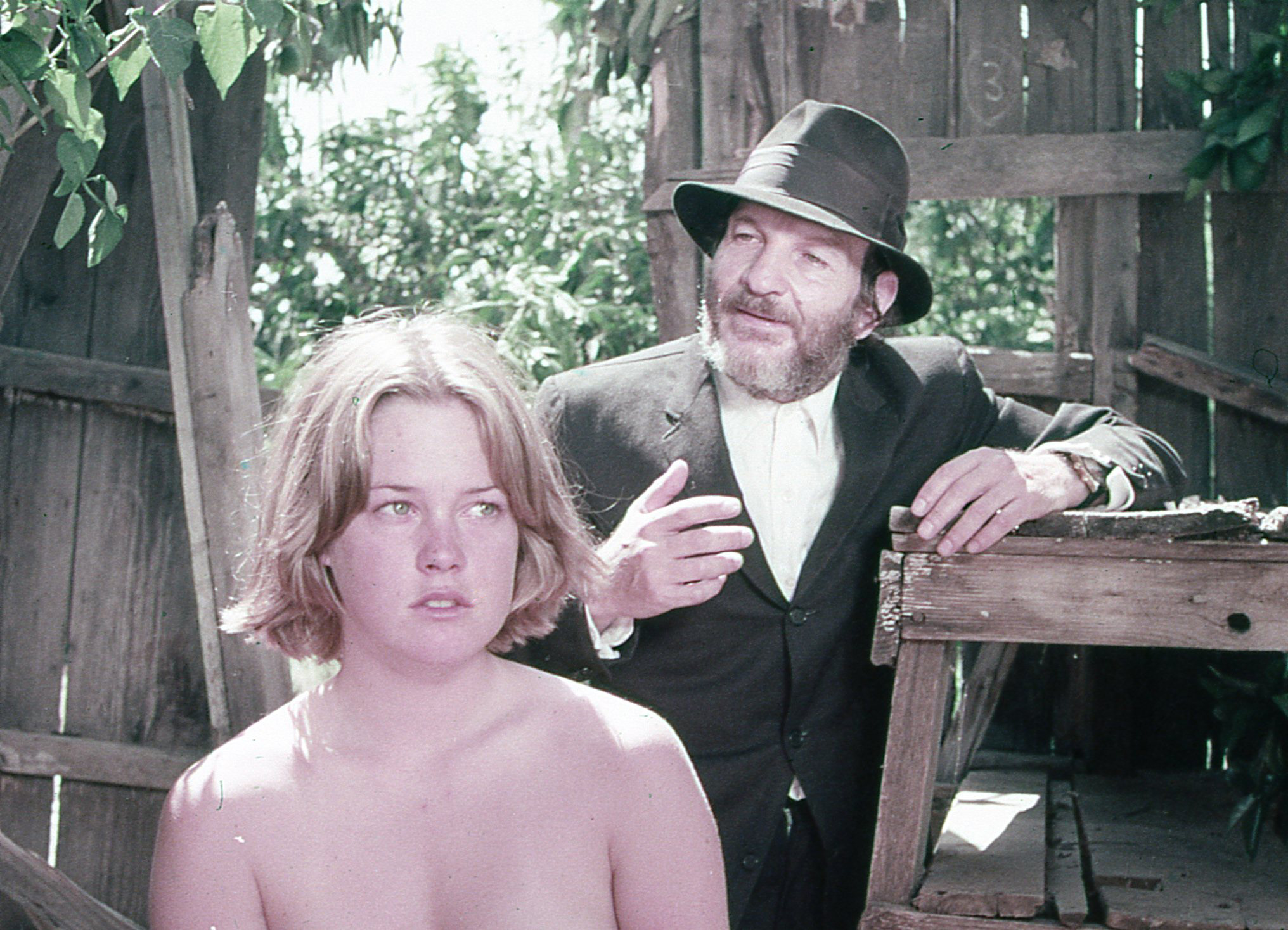 מלאני גריפית' ושייקה אופיר בסרט הגן Melanie Griffith and Shaike Ophir in Ha-Gan (1977), Israeli film